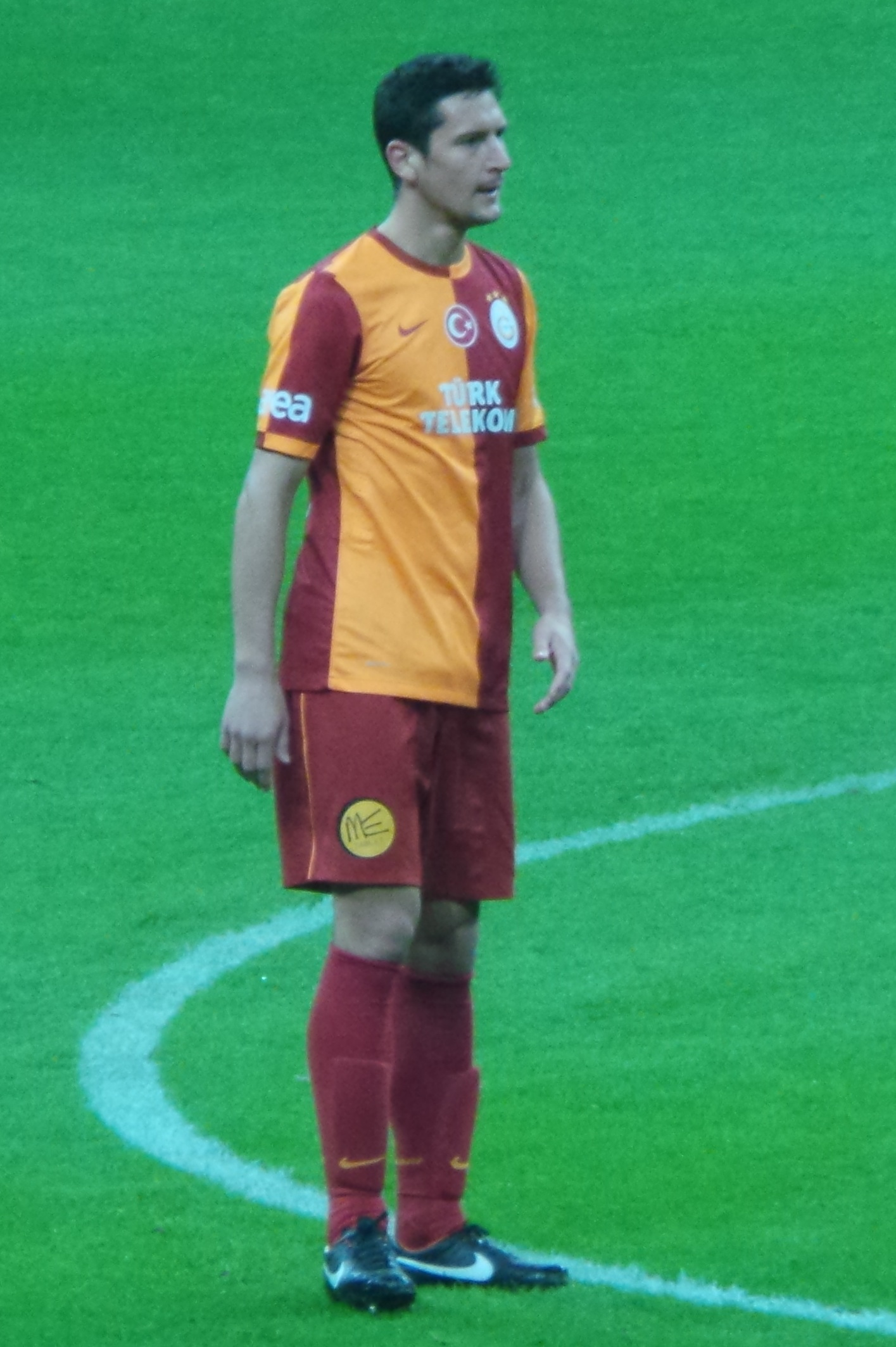 Burdisso'14